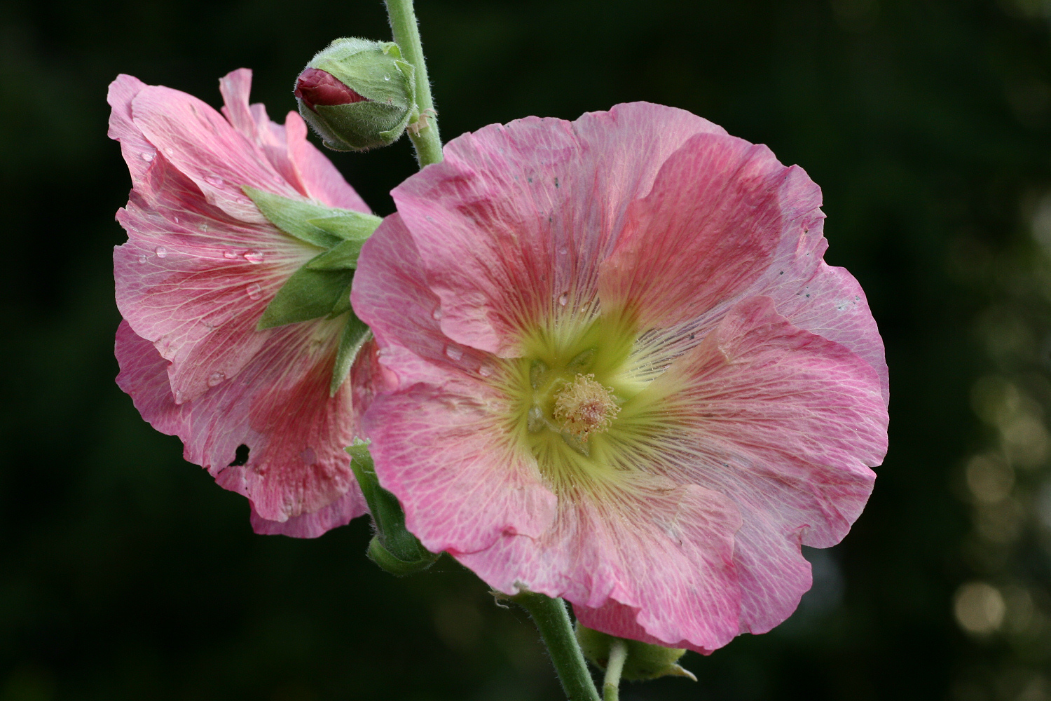 Beschreibung: Stockrose Quelle: selbst fotografiert Datum: Juli 2006 Fotograf: Karsten Dörre (grizurgbg)